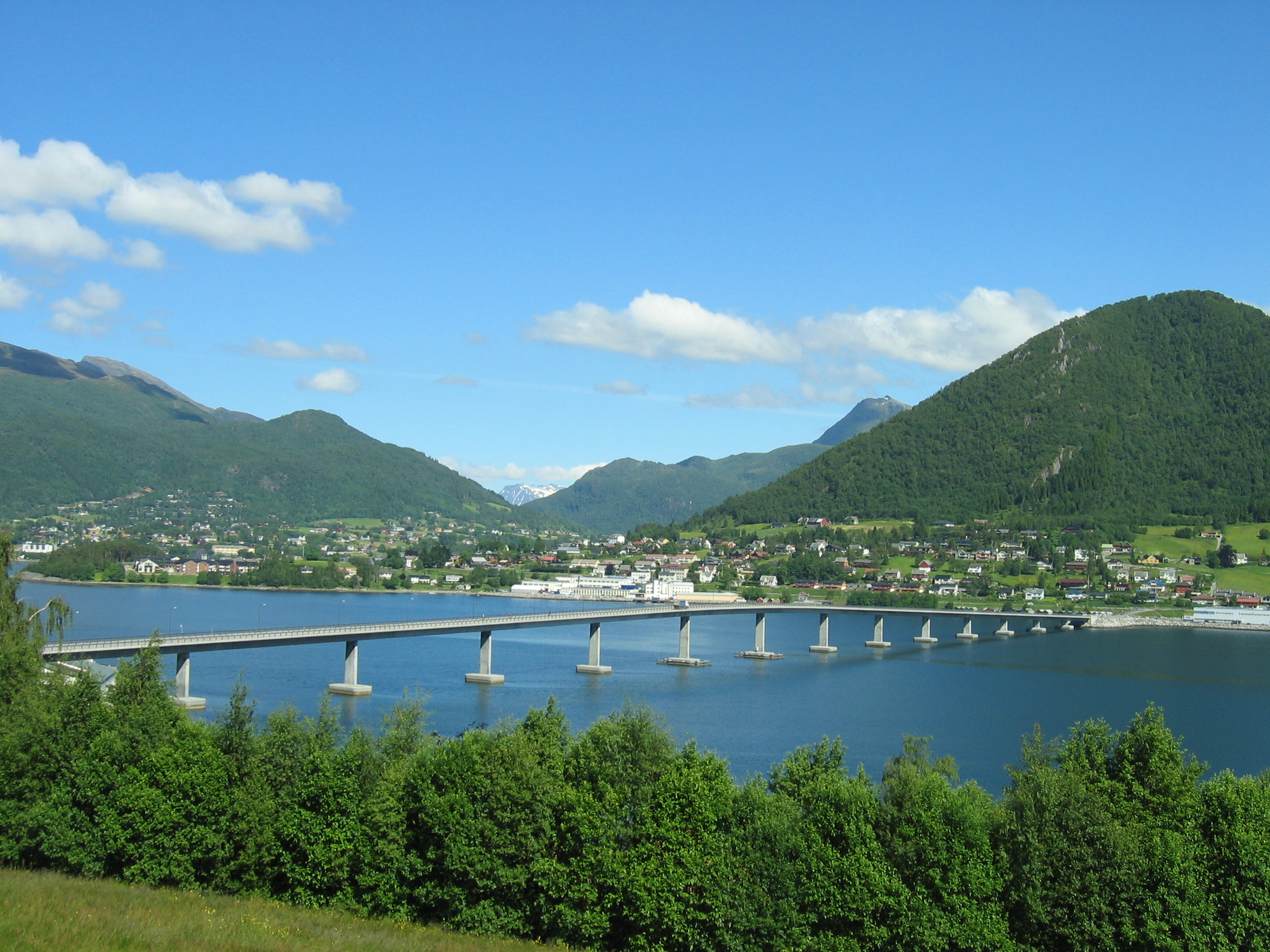 Sykkylvsbrua, Møre og Romsdal, Norway